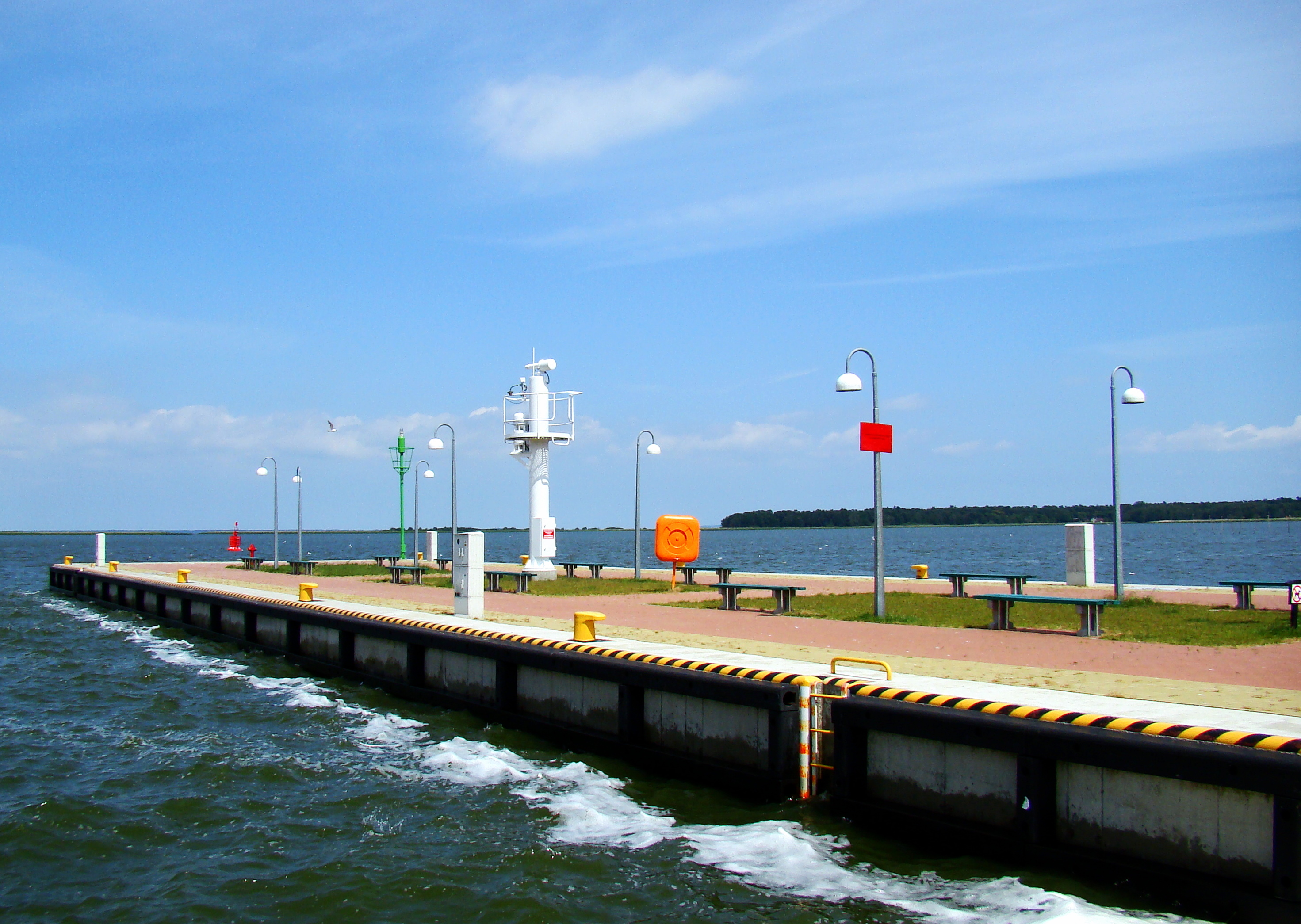 Port Nowe Warpno, Województwo zachodniopomorskie, Polska